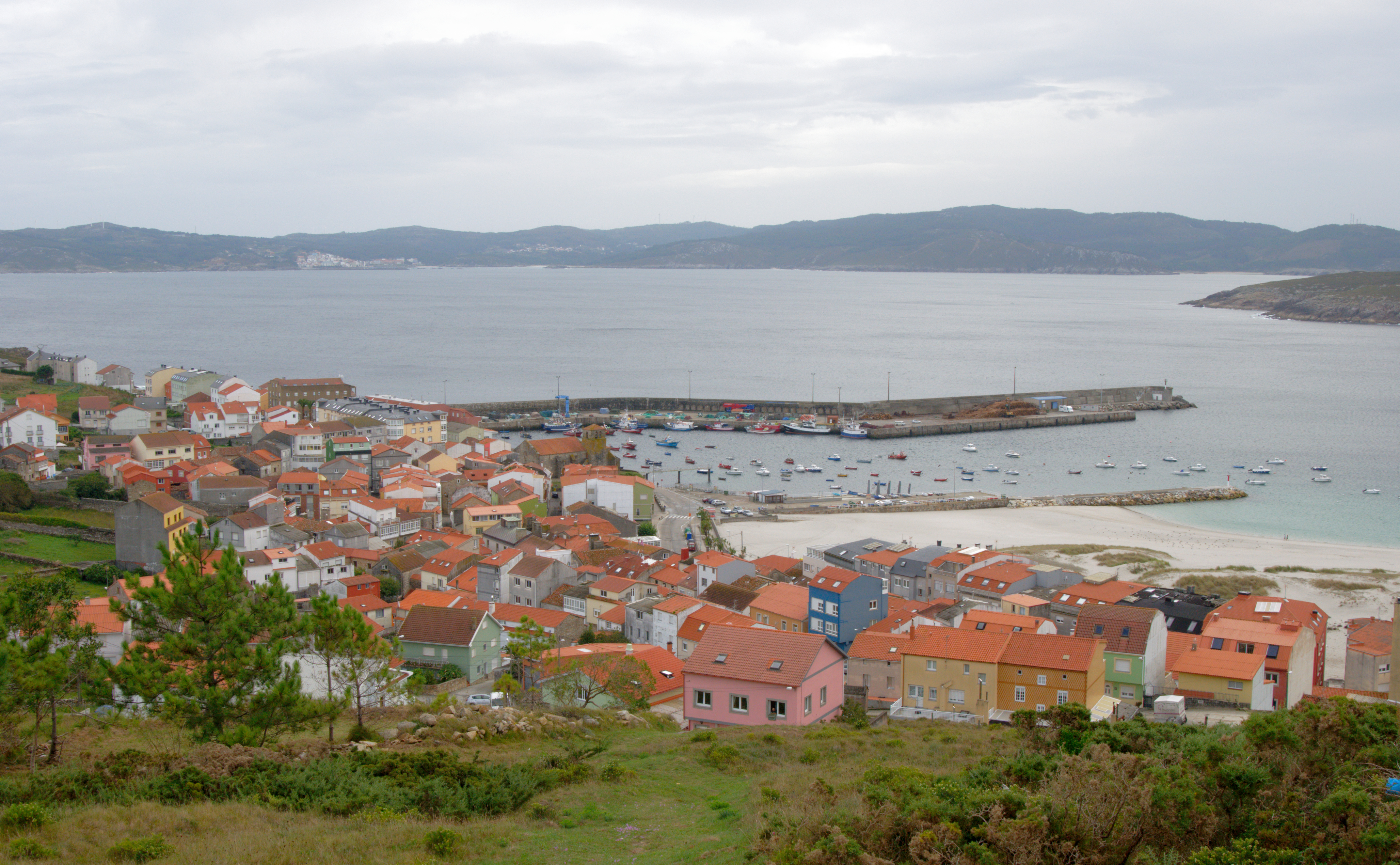 Laxe, Galicia